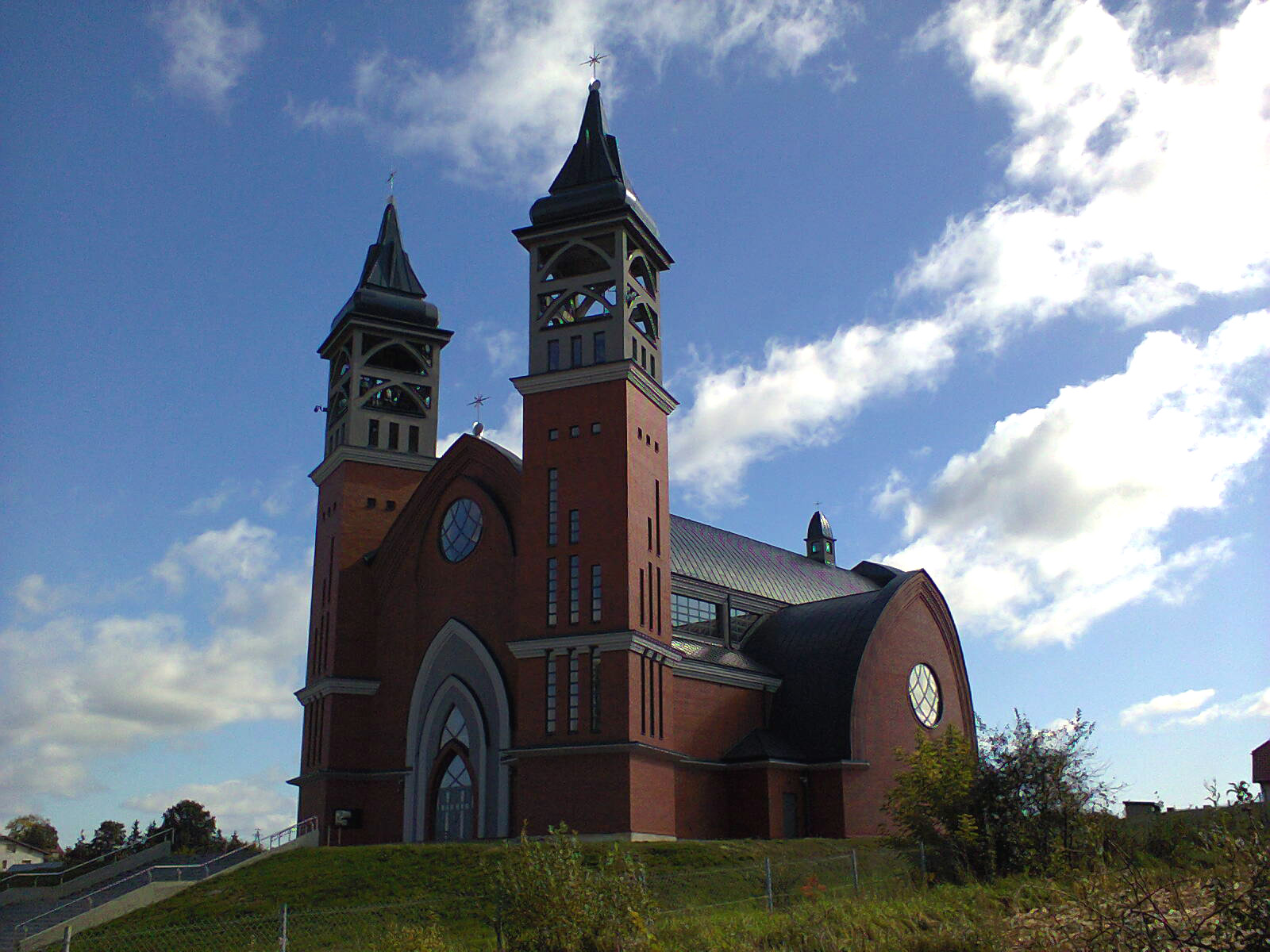 Kościół pw. Jana Pawła II w Grajewie